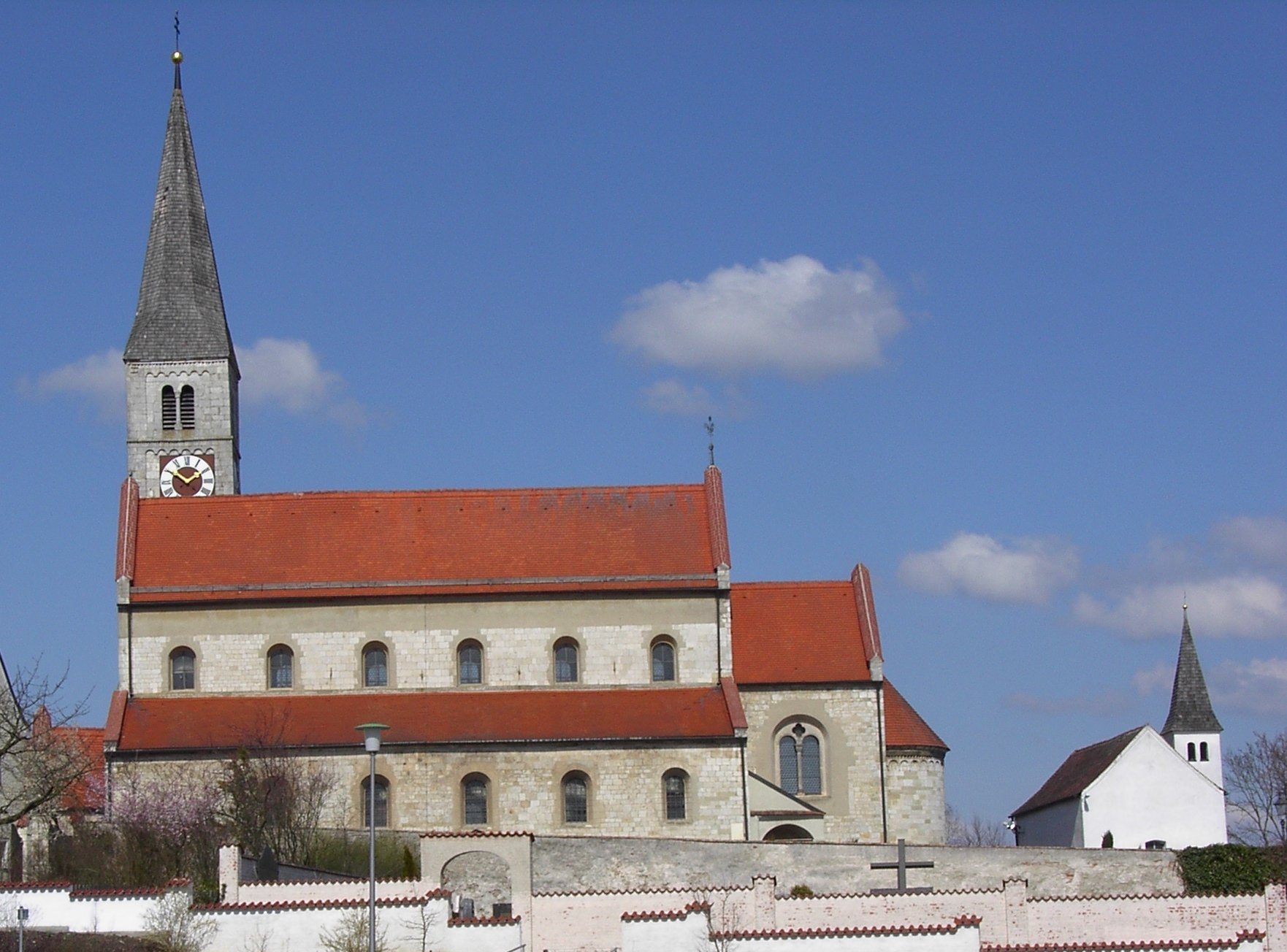 Kirche St. Margarethe in Aiterhofen